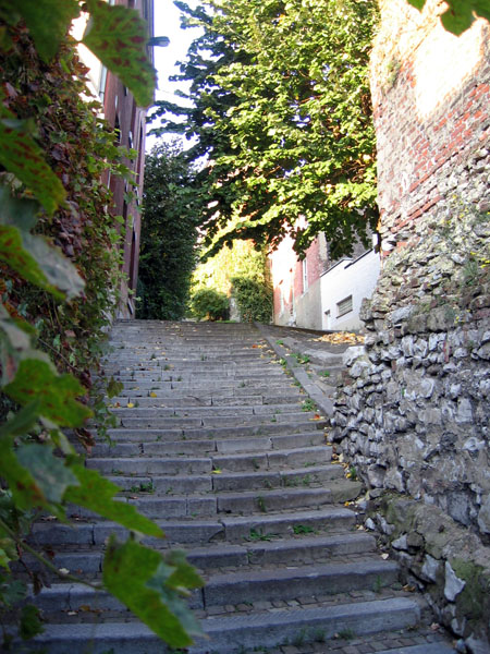 Vue des remparts - 2